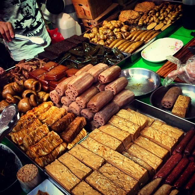 Stand de lou mei